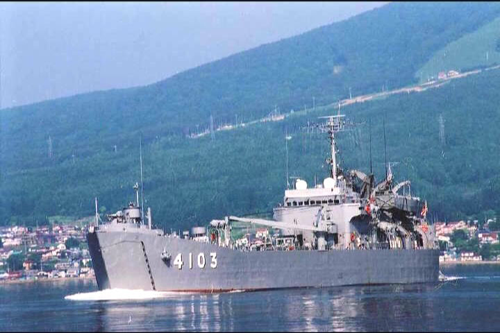 あつみ型輸送艦「ねむろ」。